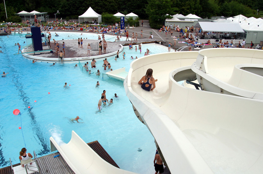 Friluftsbadet Badesøen